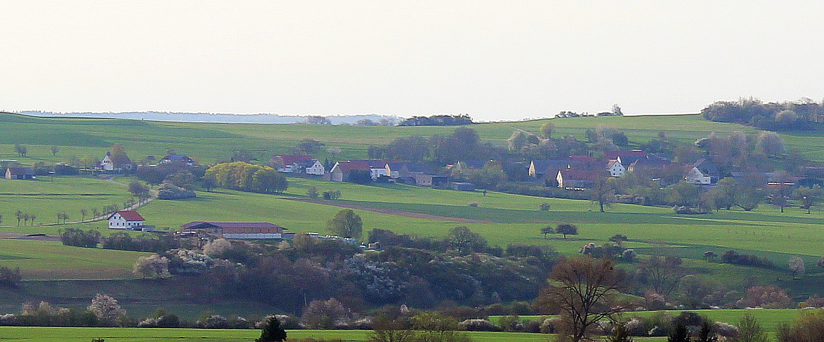 Panorama von Utweiler, Gemeinde Gersheim, Saarpfalz-Kreis, Saarland